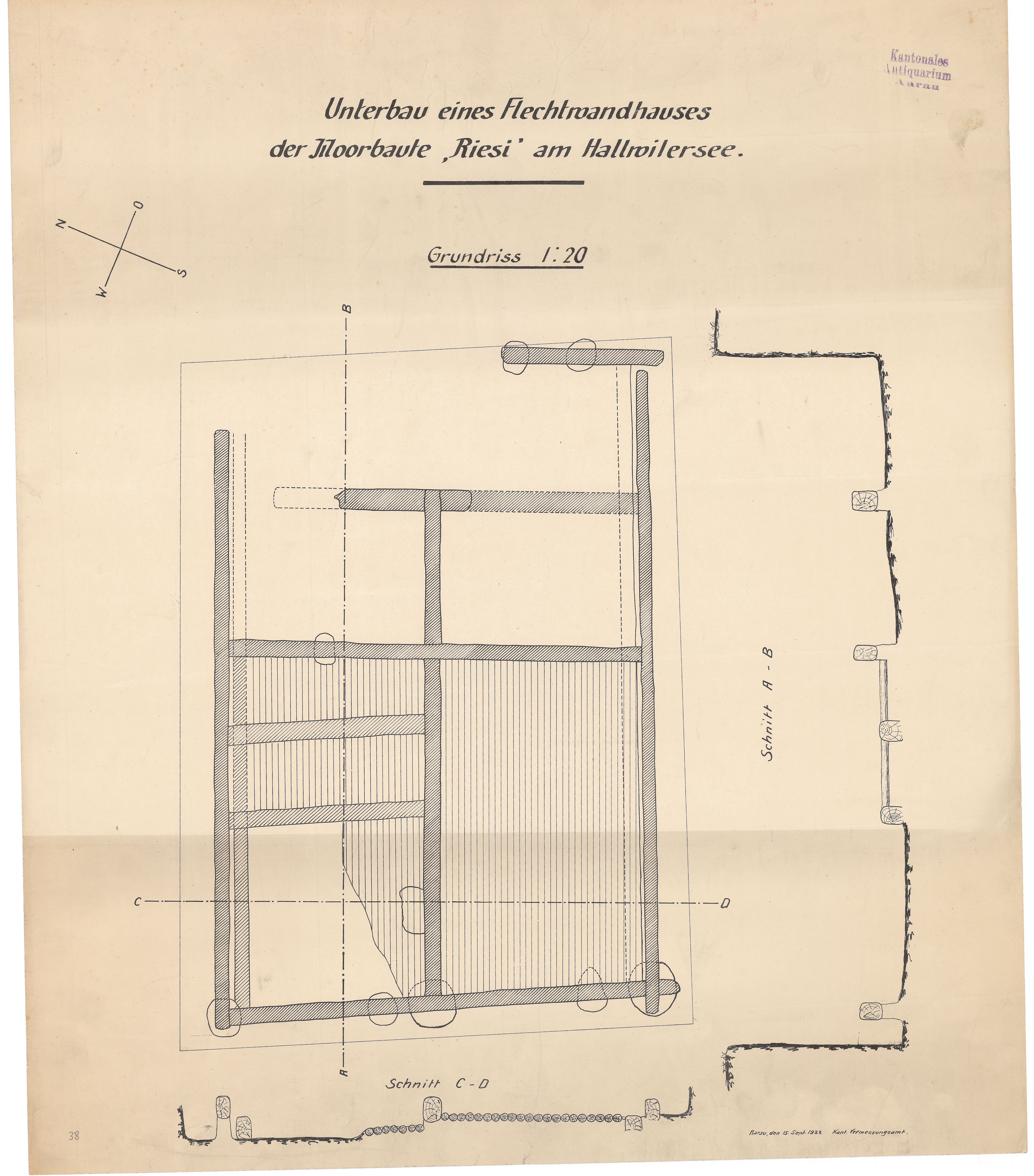 Planarchiv der Kantonsarchäologie Aargau Plankürzel: Kanton.38 Plannummer: 38 Objekt: Seeufersiedlung (Pfahlbau), Gebäudegrundriss «Blockwandhaus» Lage: Seengen, Riesi Erstellungsdatum: 15.09.1923 Plantitel: Unterbau eines Flechtwandhauses der Moorbaute "Riesi" am Hallwilersee Ausgrabung: In der Septemberkampagne 1923 wurde ungefähr in der Mitte der Siedlung ein Gebäudegrundriss im Ausmass von 4,40 m x 6,30 m freigelegt. Der Hausgrundriss zeigt eine Kombination aus senkrechten Pfosten und horizontalen Unterzügen. Das Rahmenwerk besteht aus Eichenbalken. Bosch spricht von einem «Blockwandhaus» mit einem einzigen Innenraum. Wey vermutet, dass es sich bei diesem aufgedeckten Befund um einen Unterbau handelt, auf dem erst der eigentliche Wohnbau folgt. Datierung des Befundes: Spätbronzezeit (11. – 9.. Jh. v. Chr.)